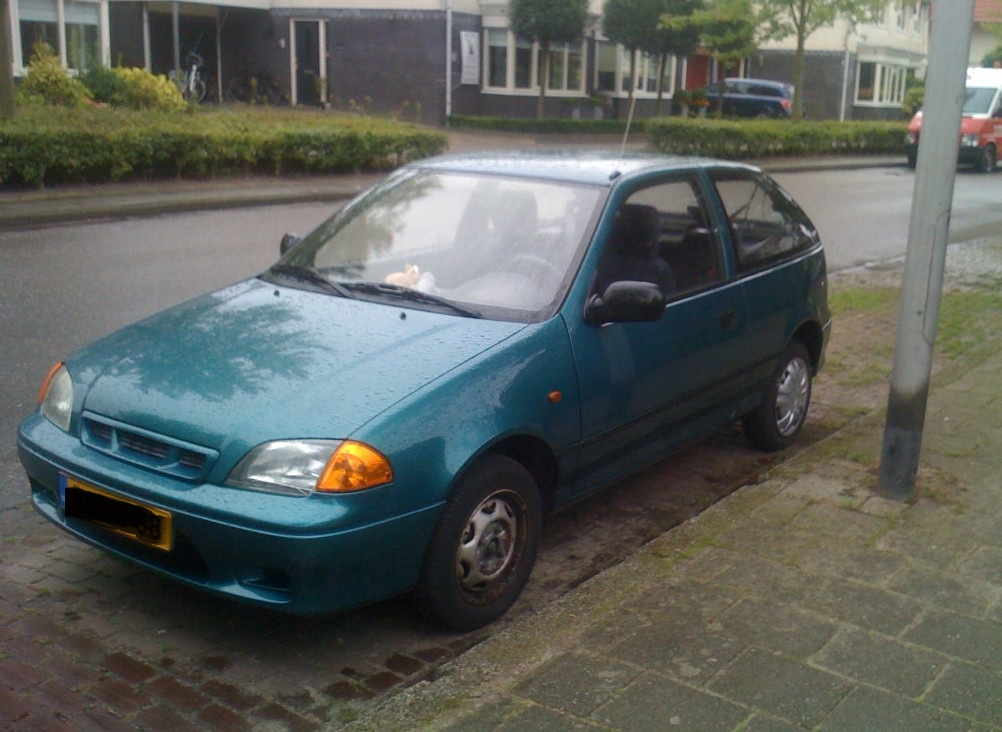 green old suzuki swift